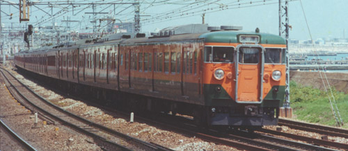 国鉄 113 湘南色（関西）